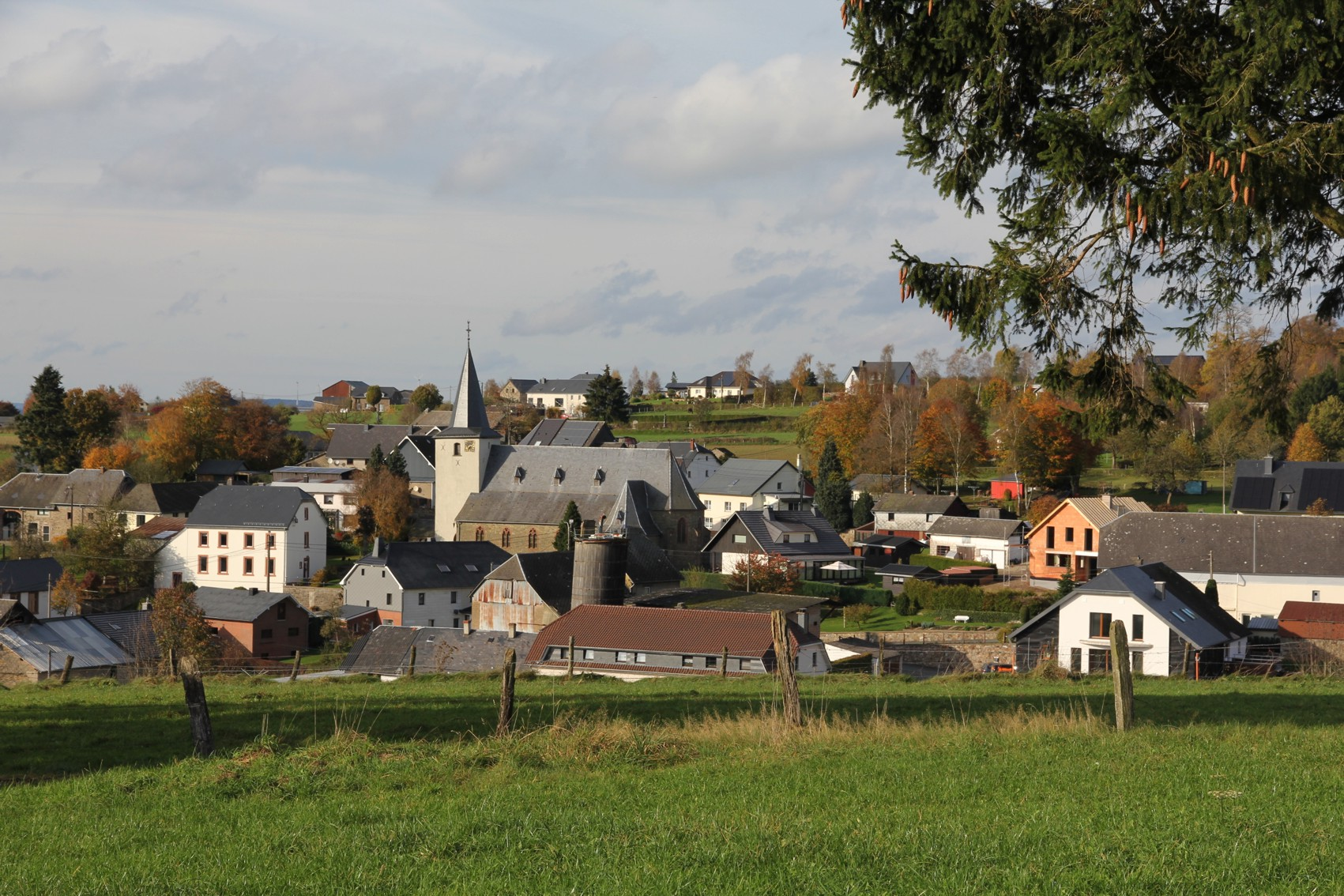 Dorfansicht von Meyerode, Amel, Belgien